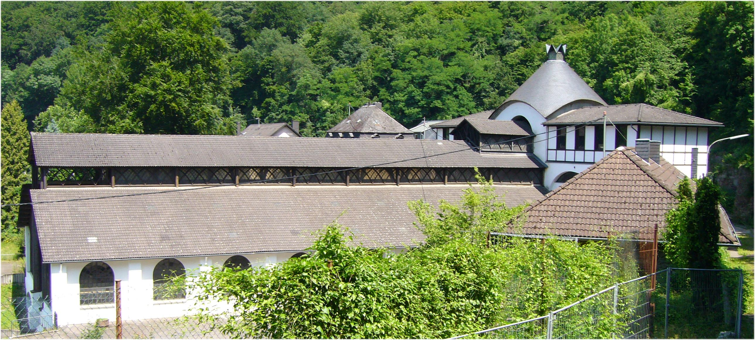 Sayner Hütte, im Hintergrund Hochofen